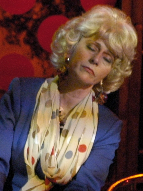 Еlizabeta Đorevska; Predstava "Dva mirisa ruže" (2005)